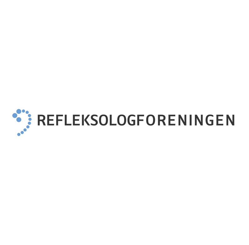 Logo til utøverorganisasjonen Refleksologforeningen.